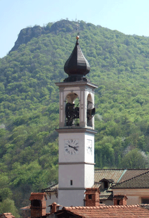 Brinzio: il campanile della chiesa parrocchiale dei Santi Pietro e Paolo.